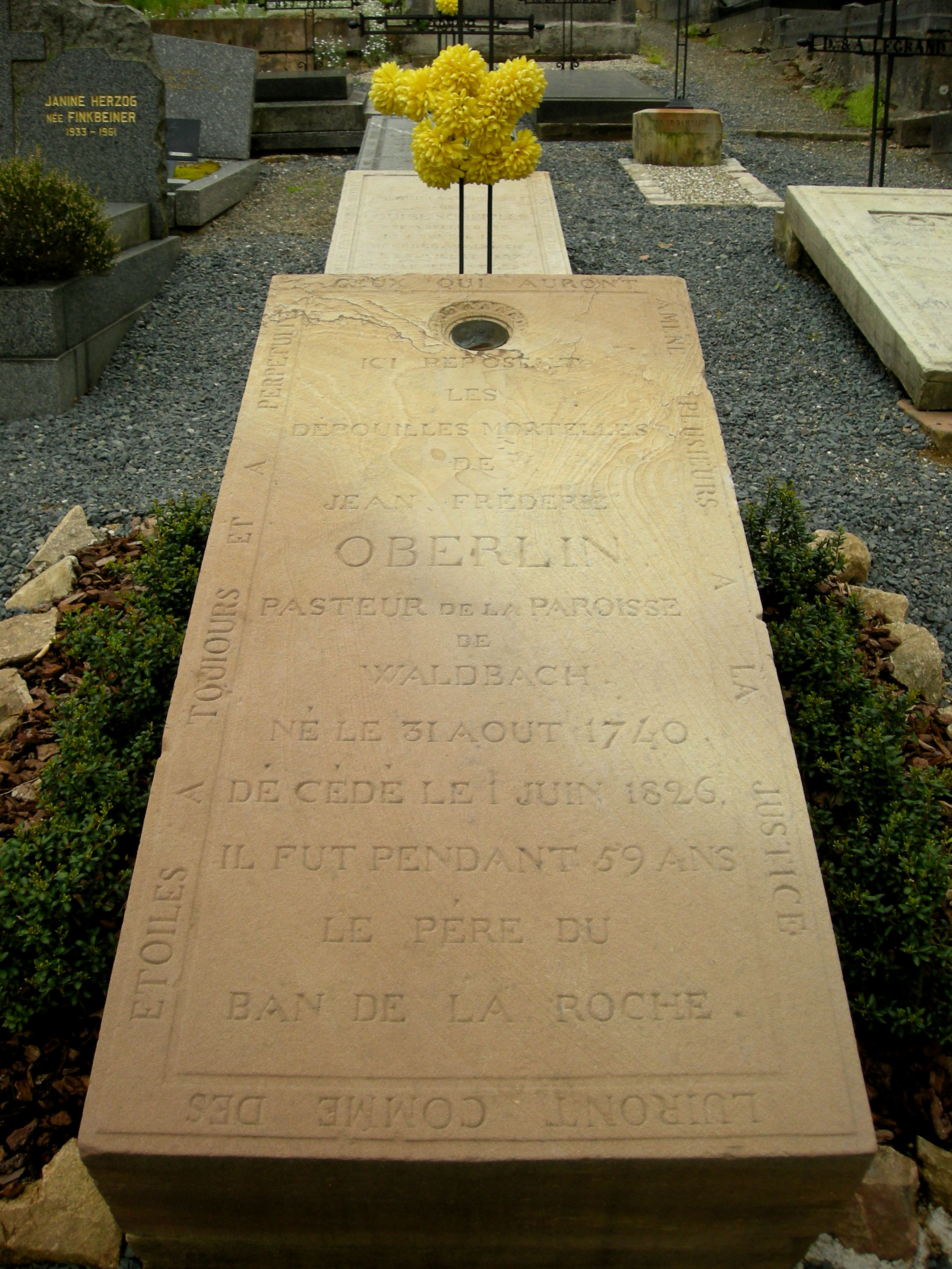 La tombe du pasteur Oberlin au cimetière de Fouday (Bas-Rhin)